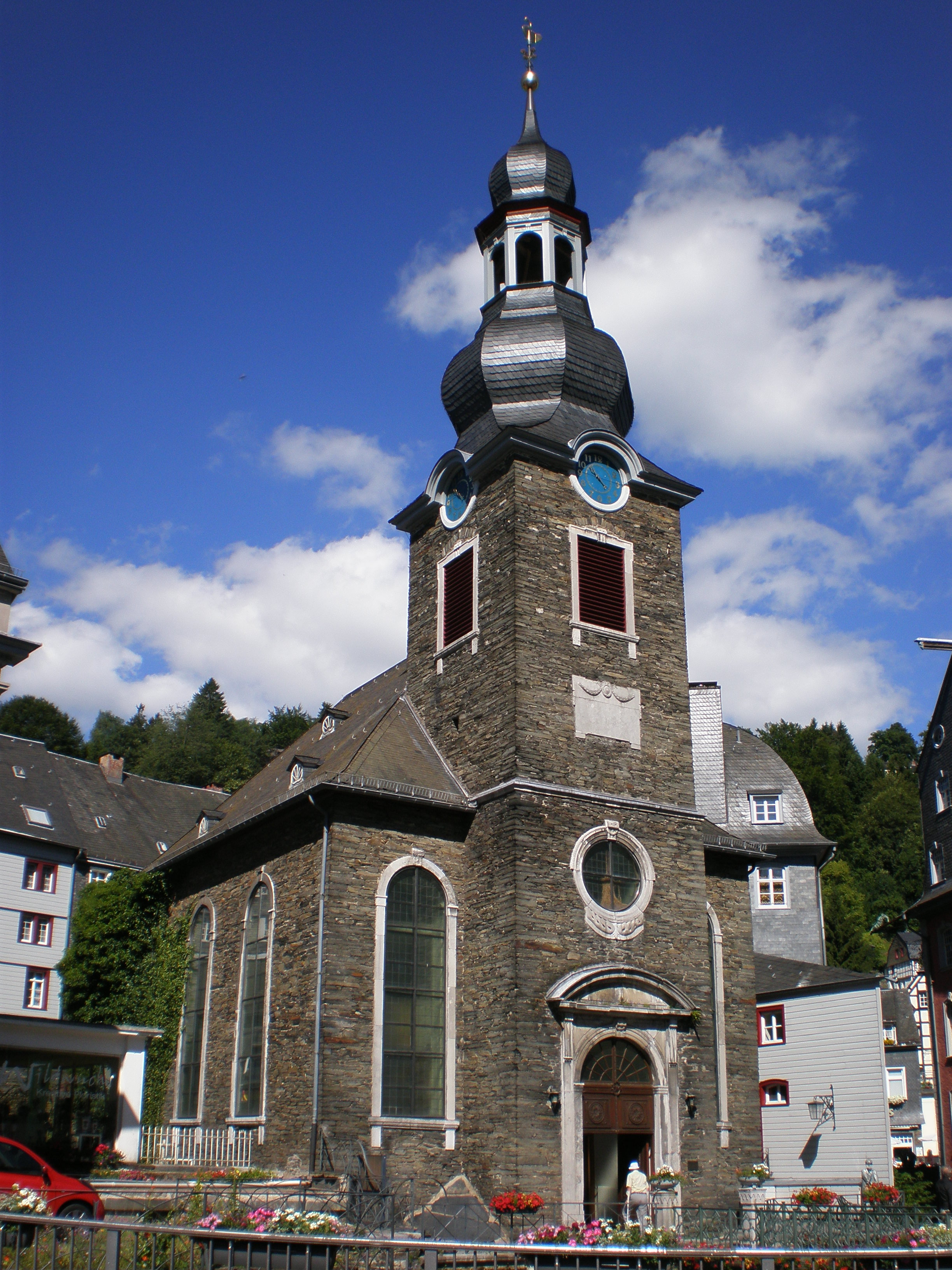 Evangelische Kirche in Monschau